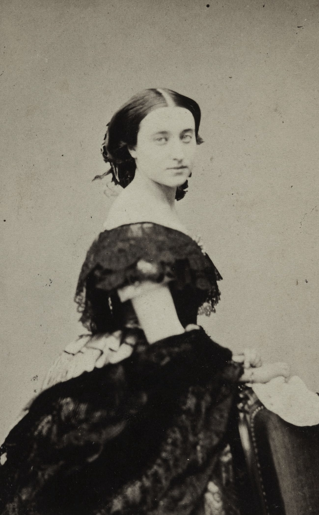 Izabella Działyńska